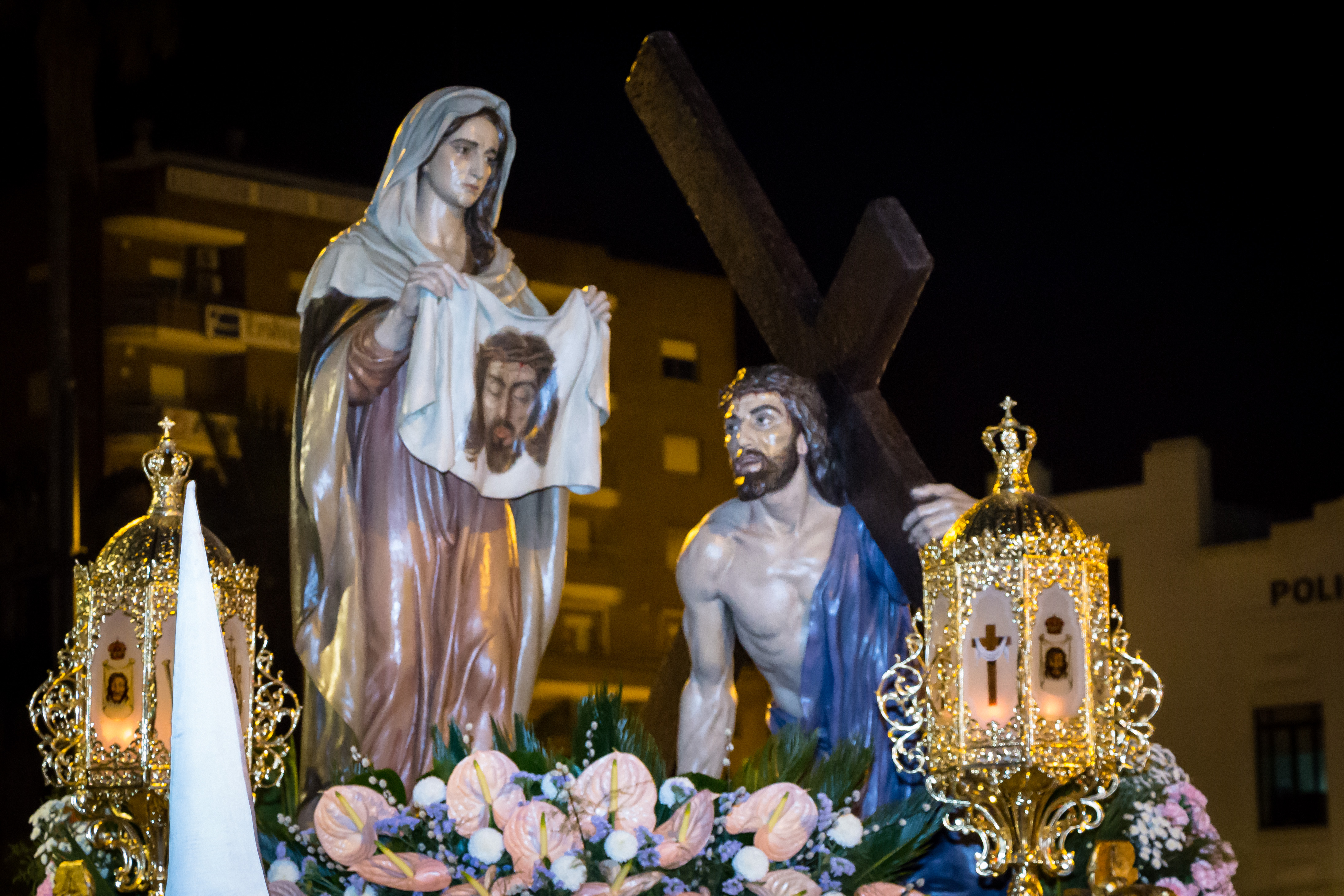 La Procesión del Santo Entierro de la Semana Santa Marinera tiene lugar la noche de Viernes Santo. This is a photography of a Folklore festival in Spain (Wikidata id Q9075846).